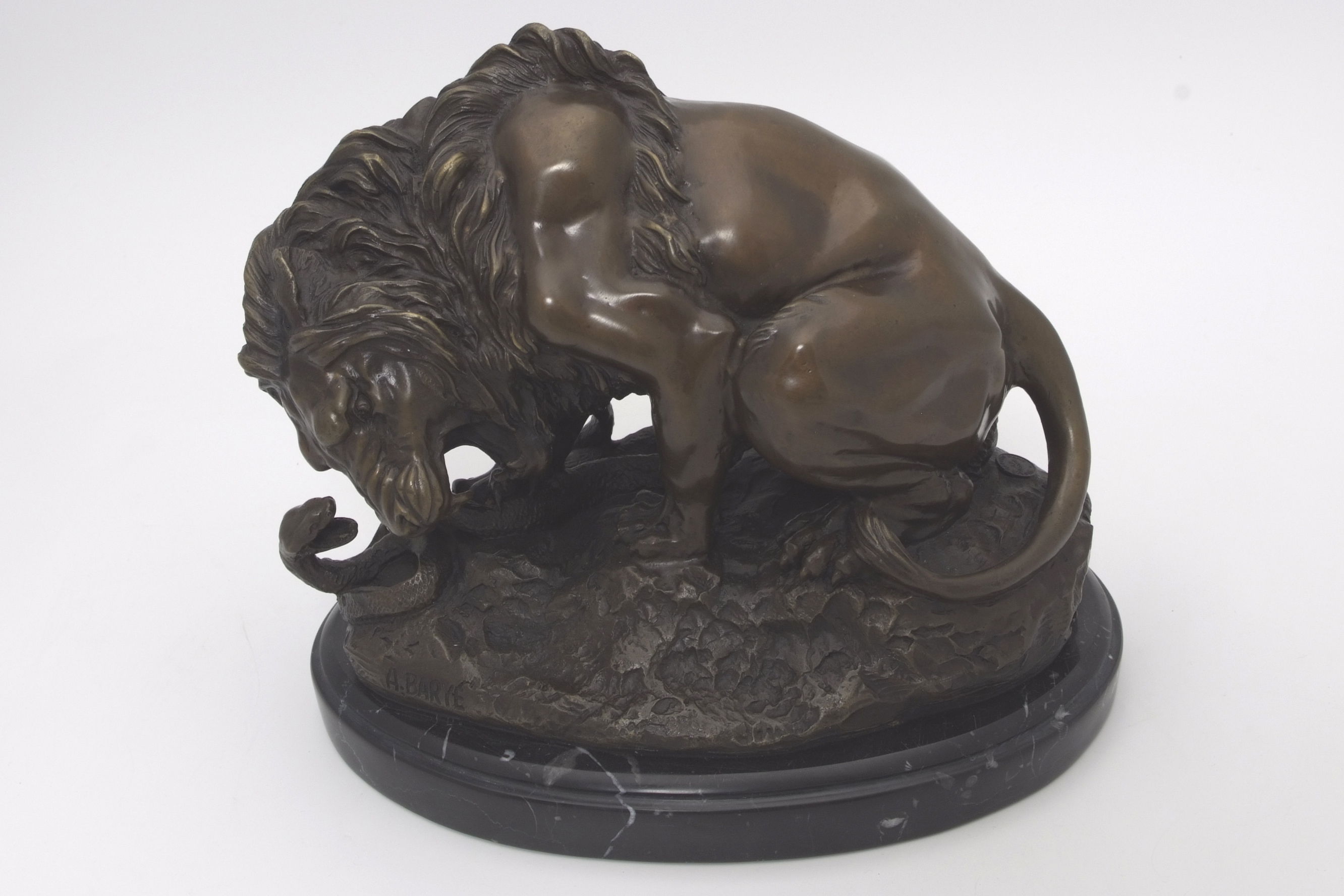 Lion au serpent, bronze réalisé par le sculpteur Antoine-Louis Barye en 1833, insigne du Service